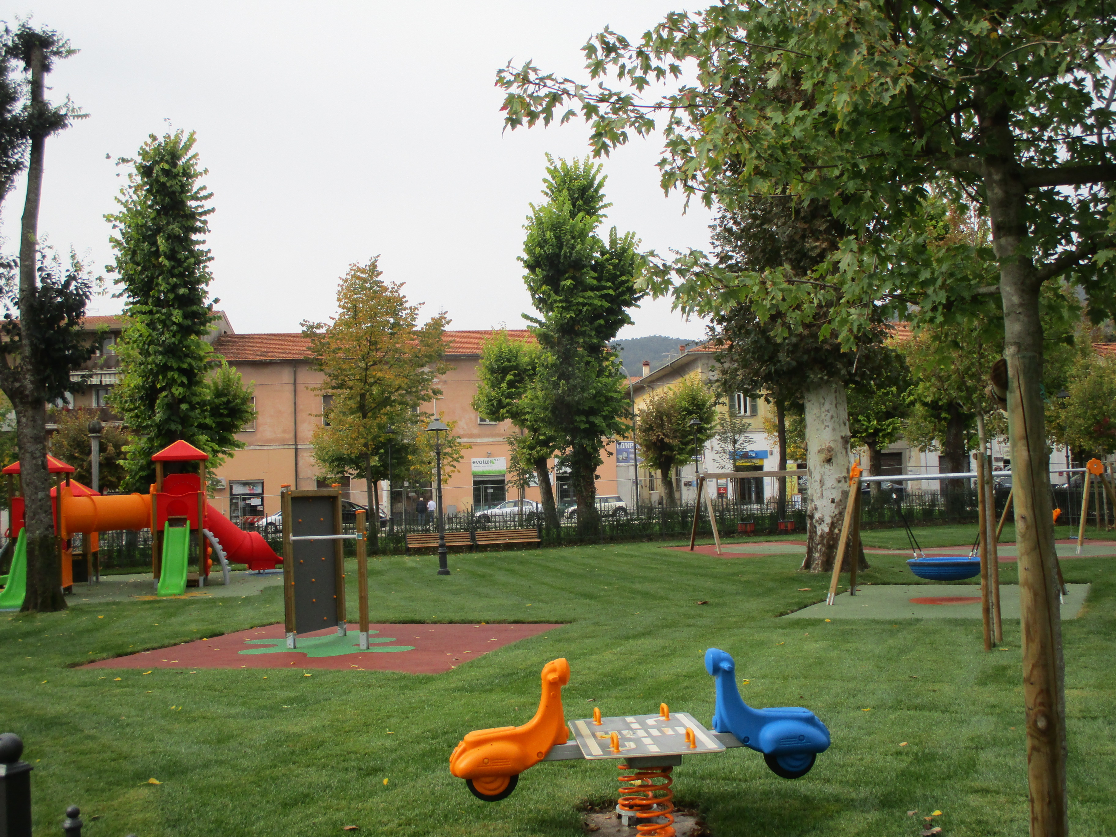 Il parco giochi inclusivo